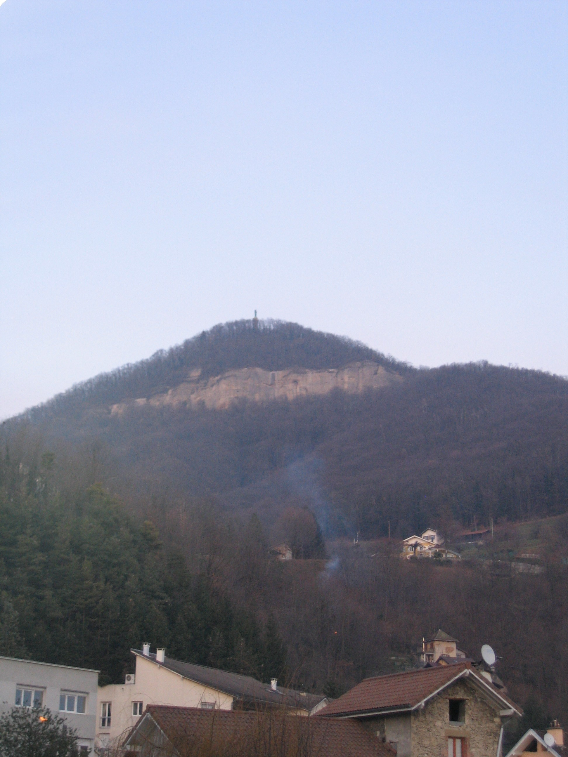 Photo de la colline de la Vouise depuis Voiron